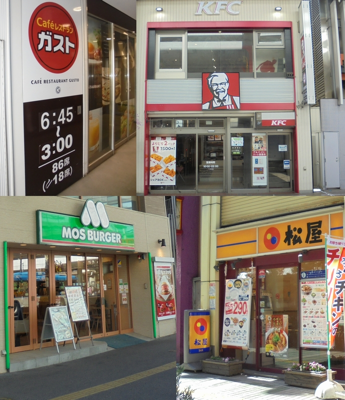 Gusto, KFC, MOS Burger, Matsuya in Kawasaki, Japan